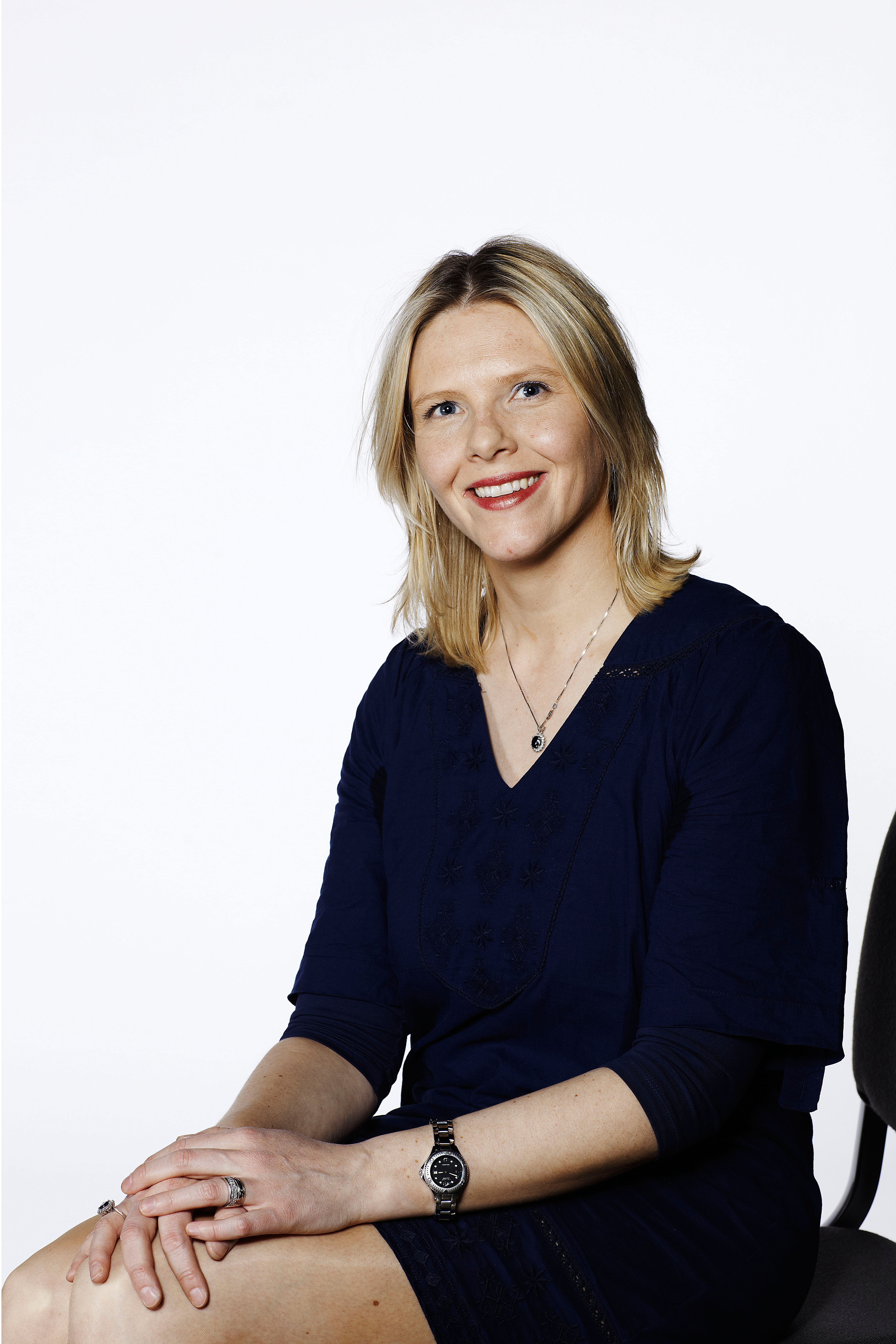 Sylvi Listhaug valgkampbilde for Stortingsvalgkampen 2009